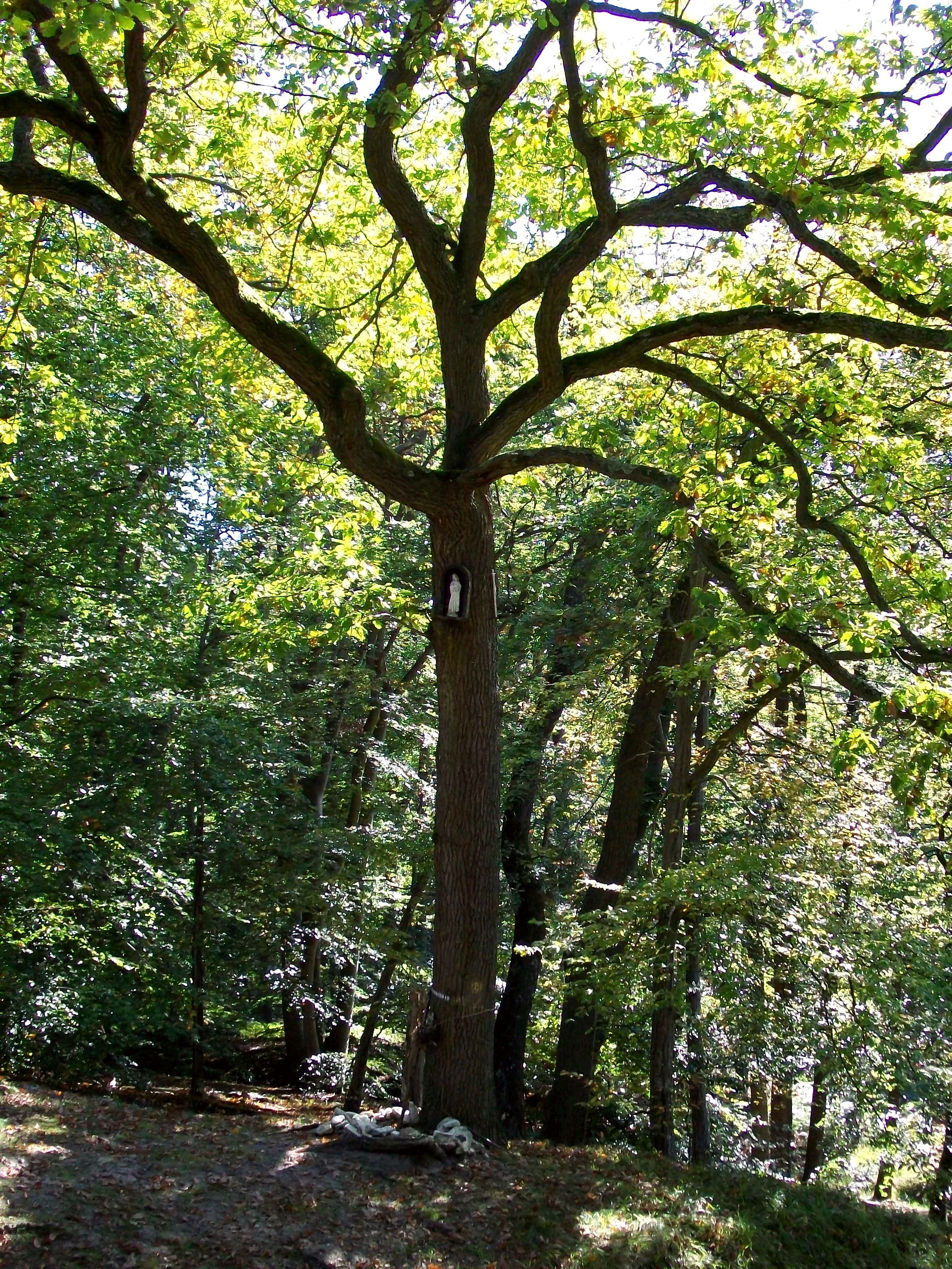 Un chêne auquel est accrochée une statuette de la vierge Marie, lieu de pèlerinage de la commune de Fleurines (60) depuis 1587.